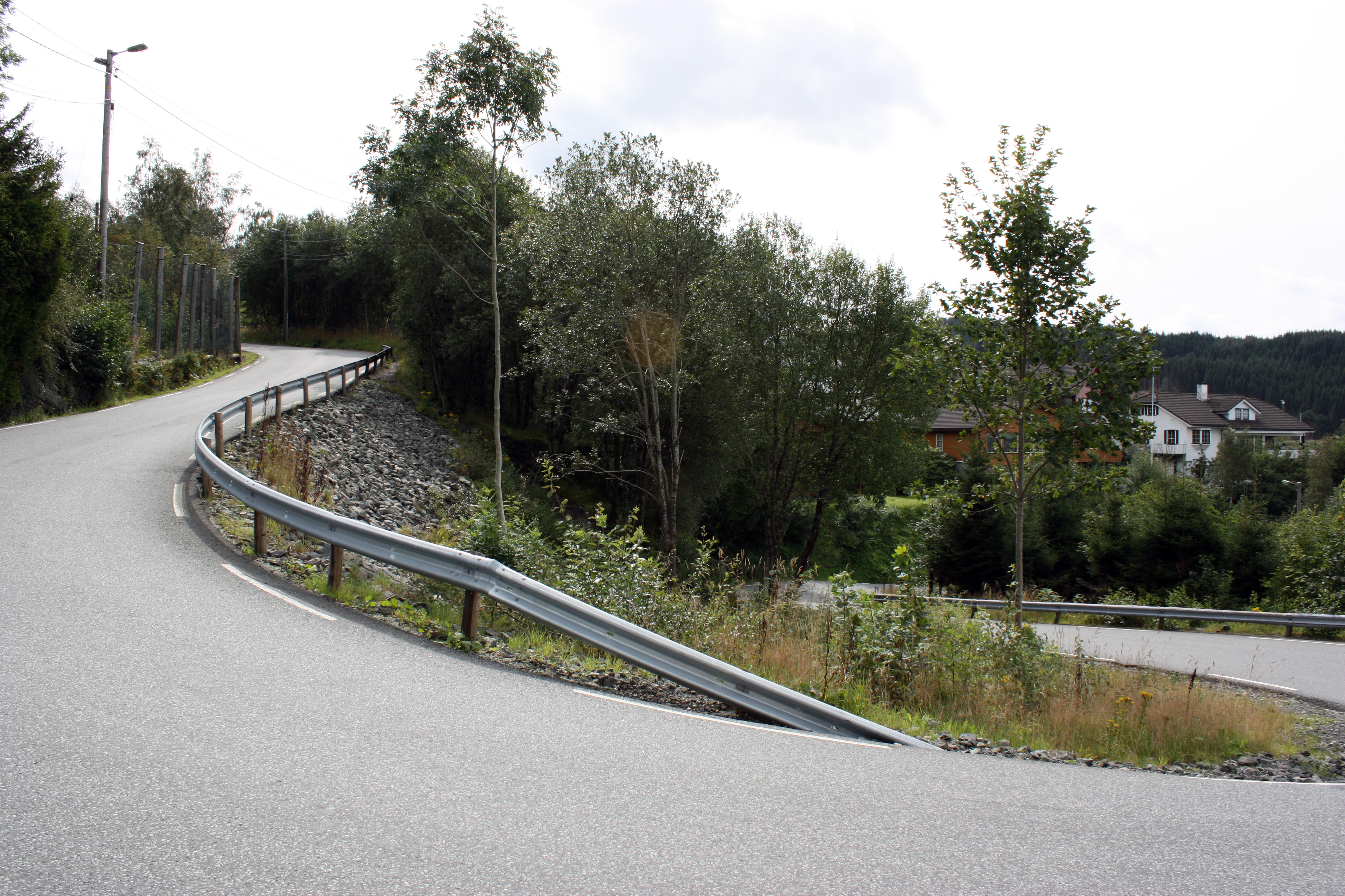 Smøråsvegen, Fana, Bergen. August 2009.